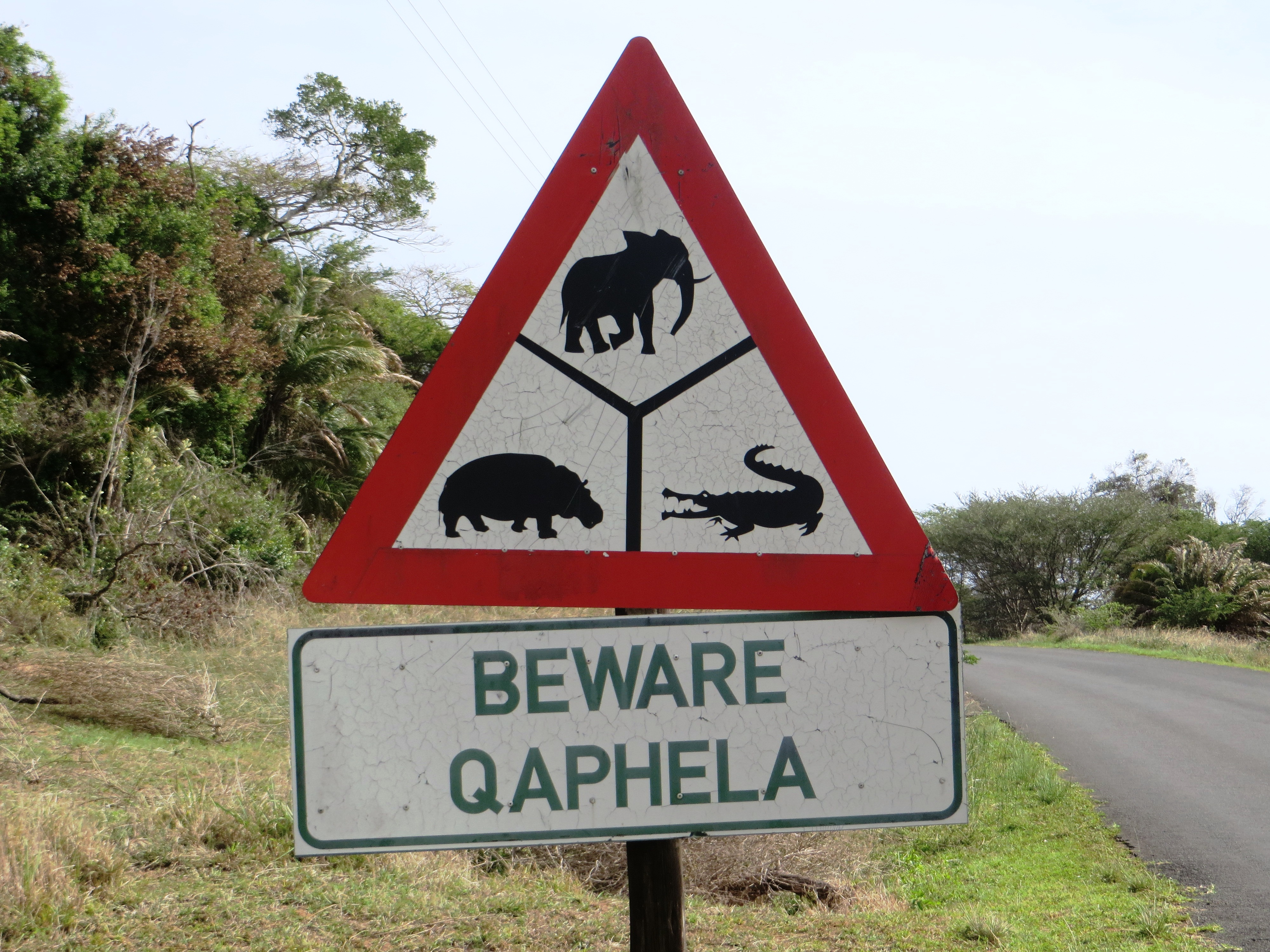 overstekend wild